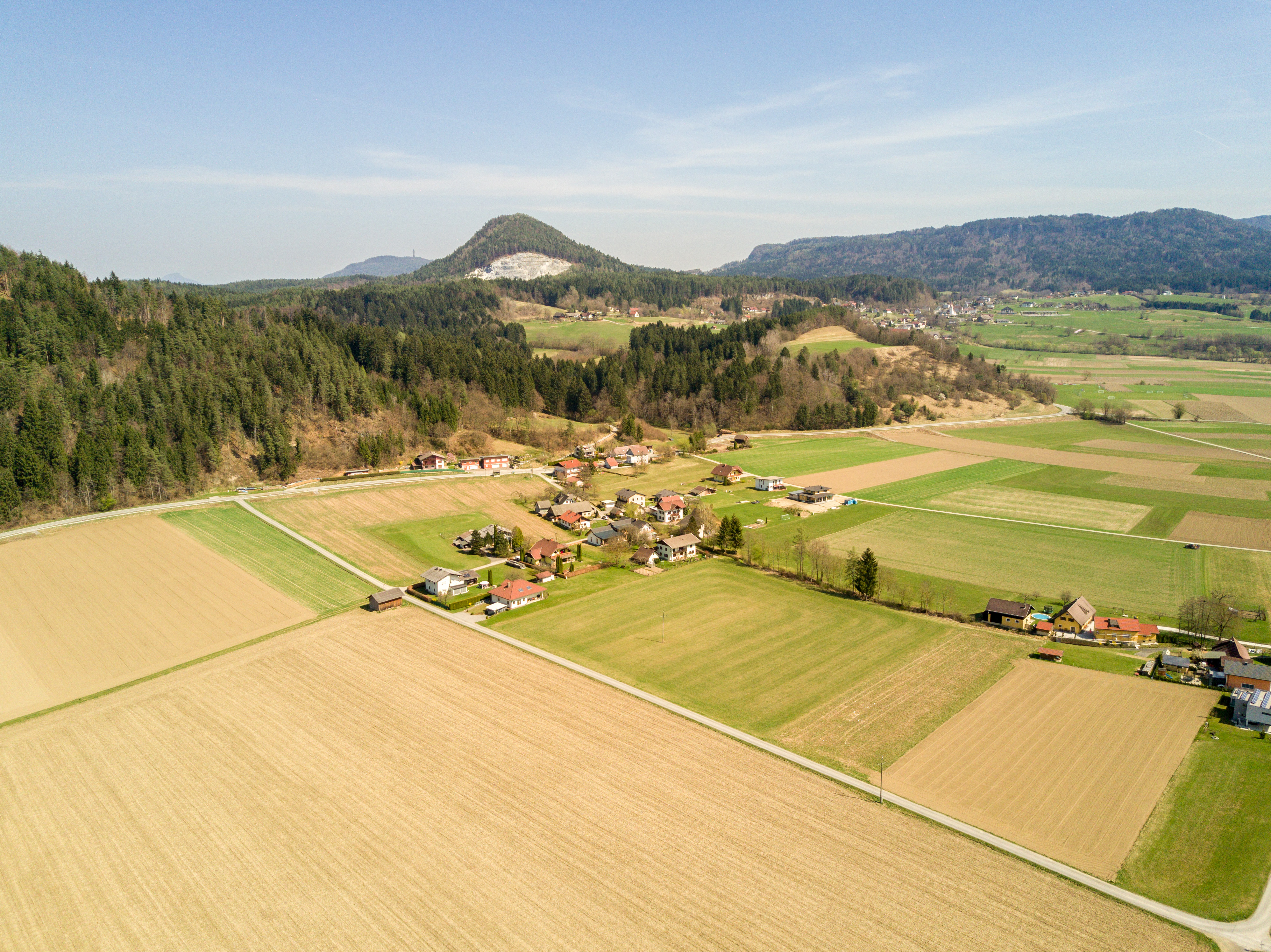 Aufnahme von "Oberdieschitz".